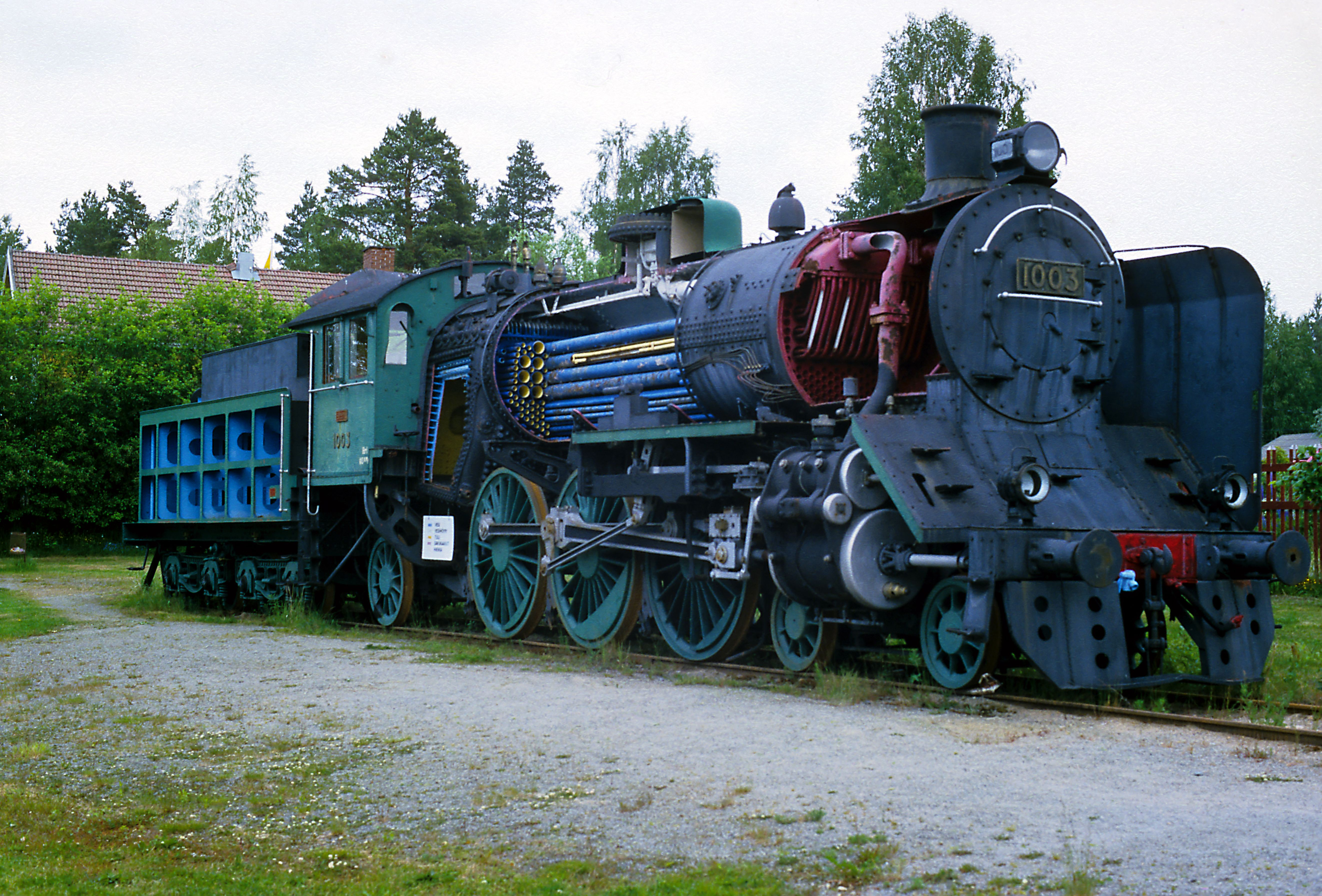 2’C1’ h2-Schnellzuglok, aufgeschnitten im Dampflokpark Haapamäki